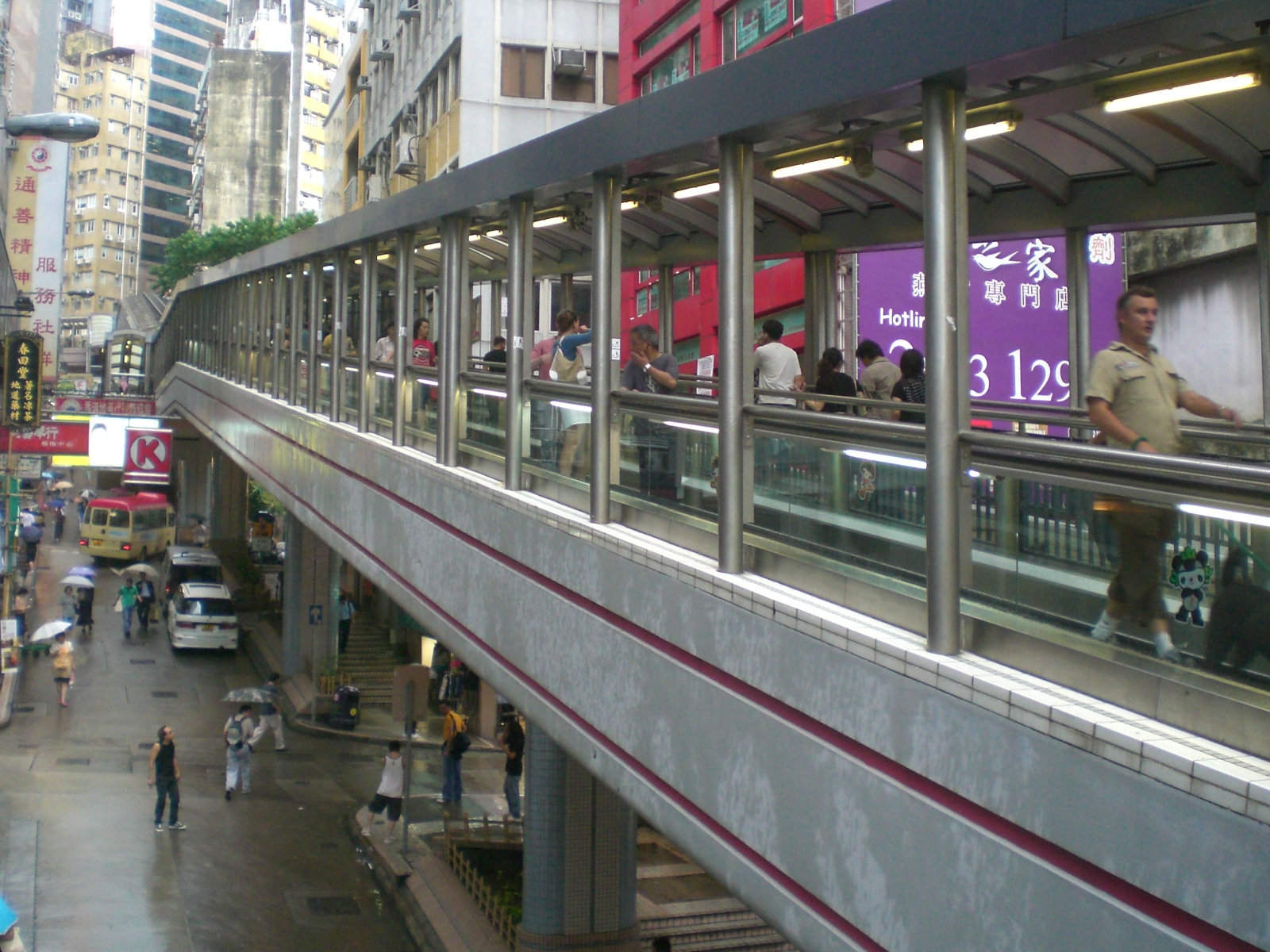 香港zh:中環閣麟街中環至半山自動扶梯系統